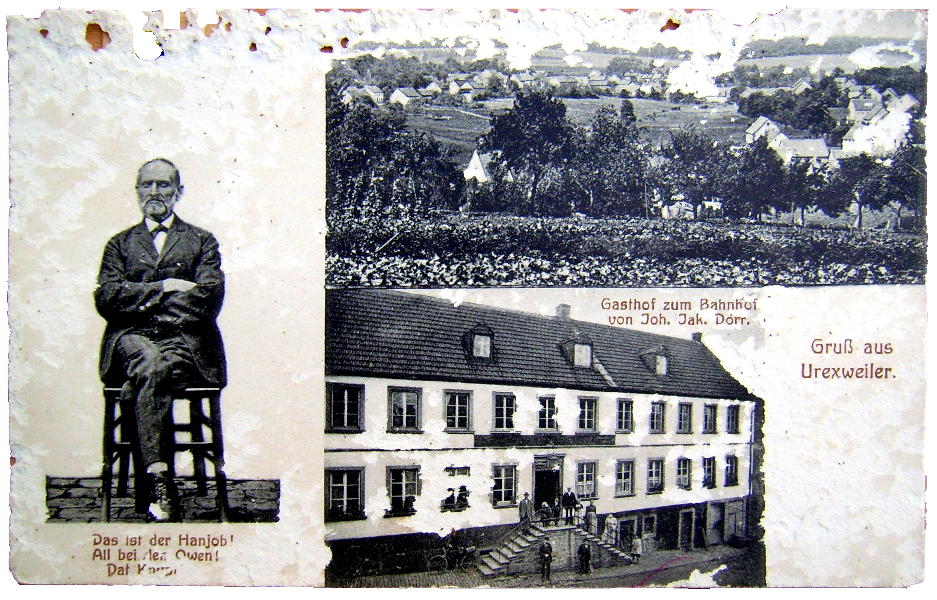 Johann Jakob Dörr alias Hanjob aus Urexweiler, 13 Kinder aus erster Ehe, 13 Kinder aus zweiter Ehe [1]